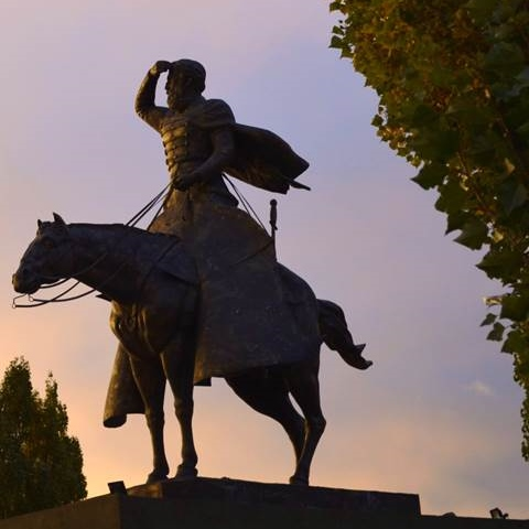 El 4 de diciembre de 1959, "... en el mediodia de un esplendido dái de erano que fue como la alborada de un nuevo día.." palabras del Dr. Jorge Blachere. un grupo de hombres y mujeres colocan en el centro de este hermoso valle la piedra fundacional, encontándose ubicada hoy el acta respectiva debajo del mástil central en la Plaza Martín Miguel de Güemes de esta ciudad.